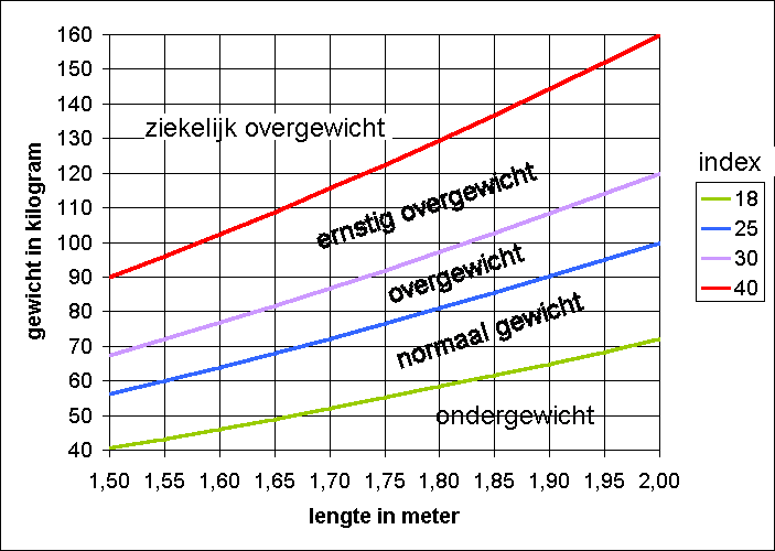 Quetelet index, eigen werk door Gebruiker:Ellywa ter beschikking gesteld onder GNU FDL